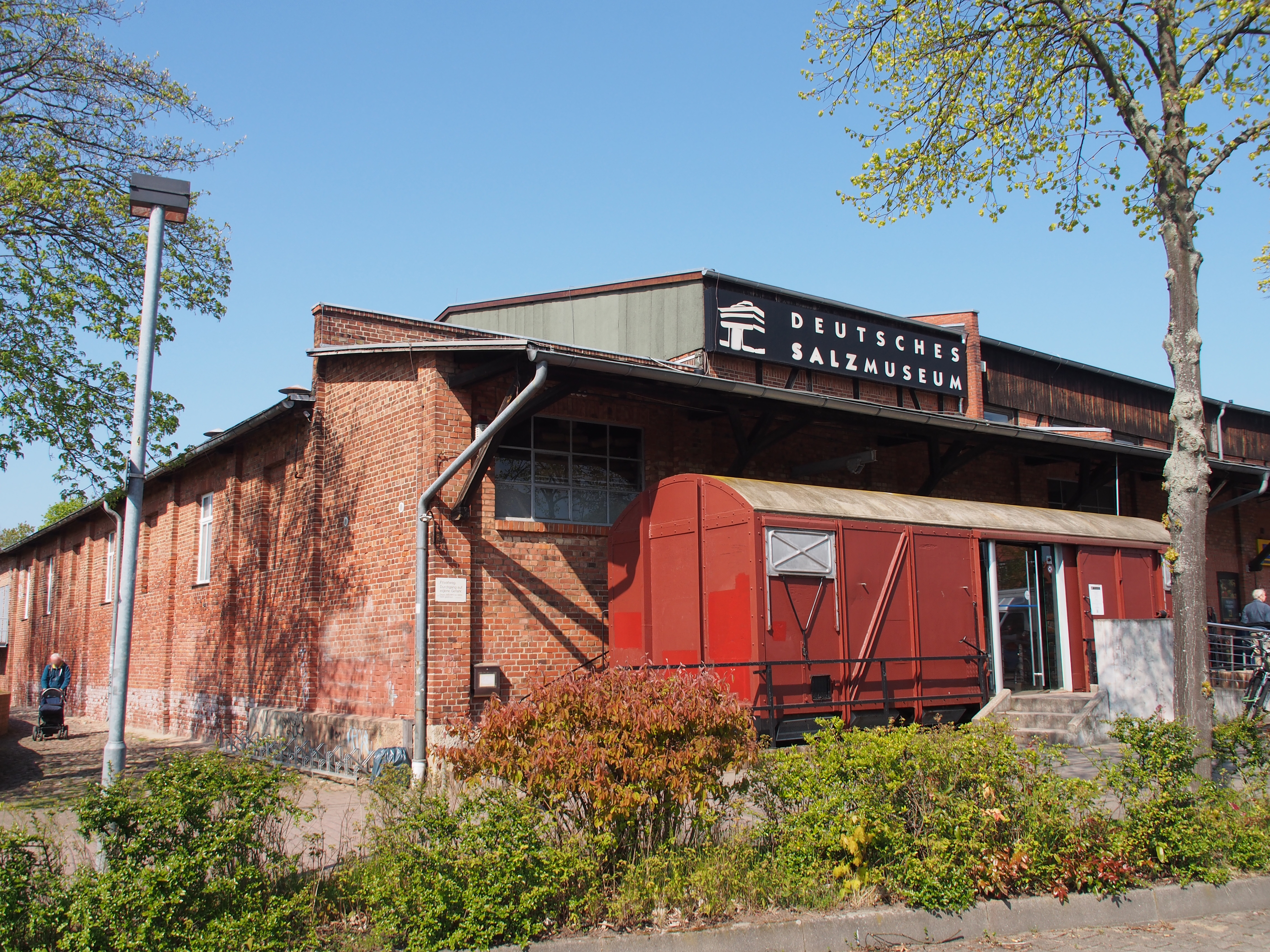 Deutsches Salzmuseum Lüneburg, Eingang durch den Waggon